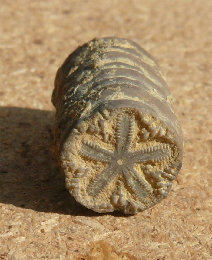 Stielglieder von Seirocrinus sp. aus dem Unterjura, Unteres Pliensbachium, Albvorland